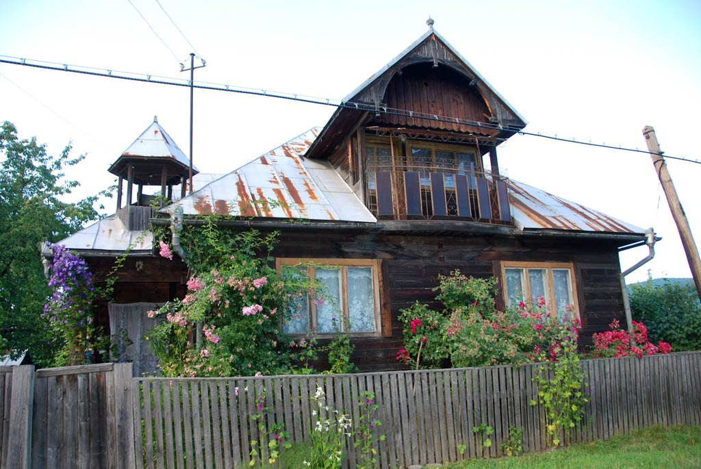 Bocicoiu Mare, Maramureş, Rumänien – typisches altes Holzhaus